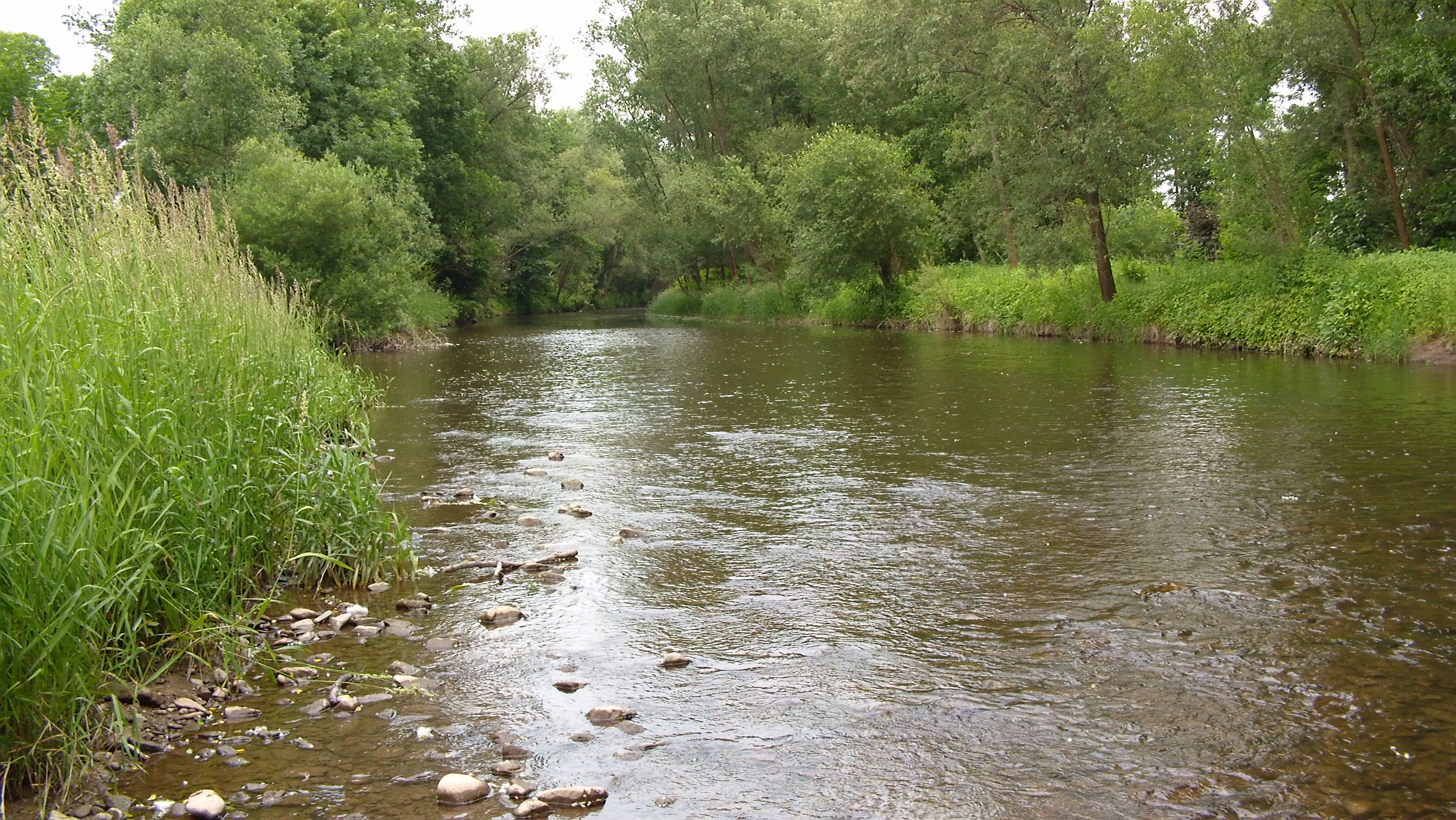 Die Oder im Abschnitt Wulften, Naturschutzgebiet „Oderaue“